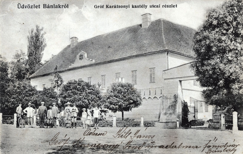 Fațada de sud a castelului din Banloc in anul 1906. 01